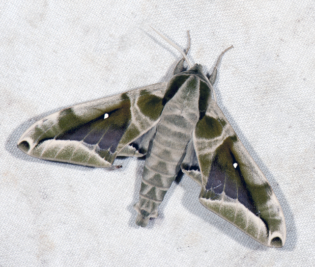 _DSJ3800 Parum colligata